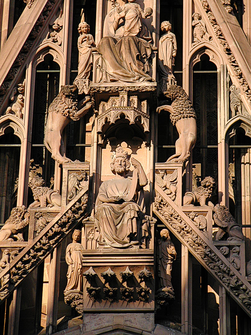 Straßburg